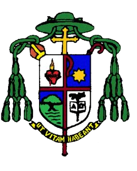 Diócesis de Tilarán.